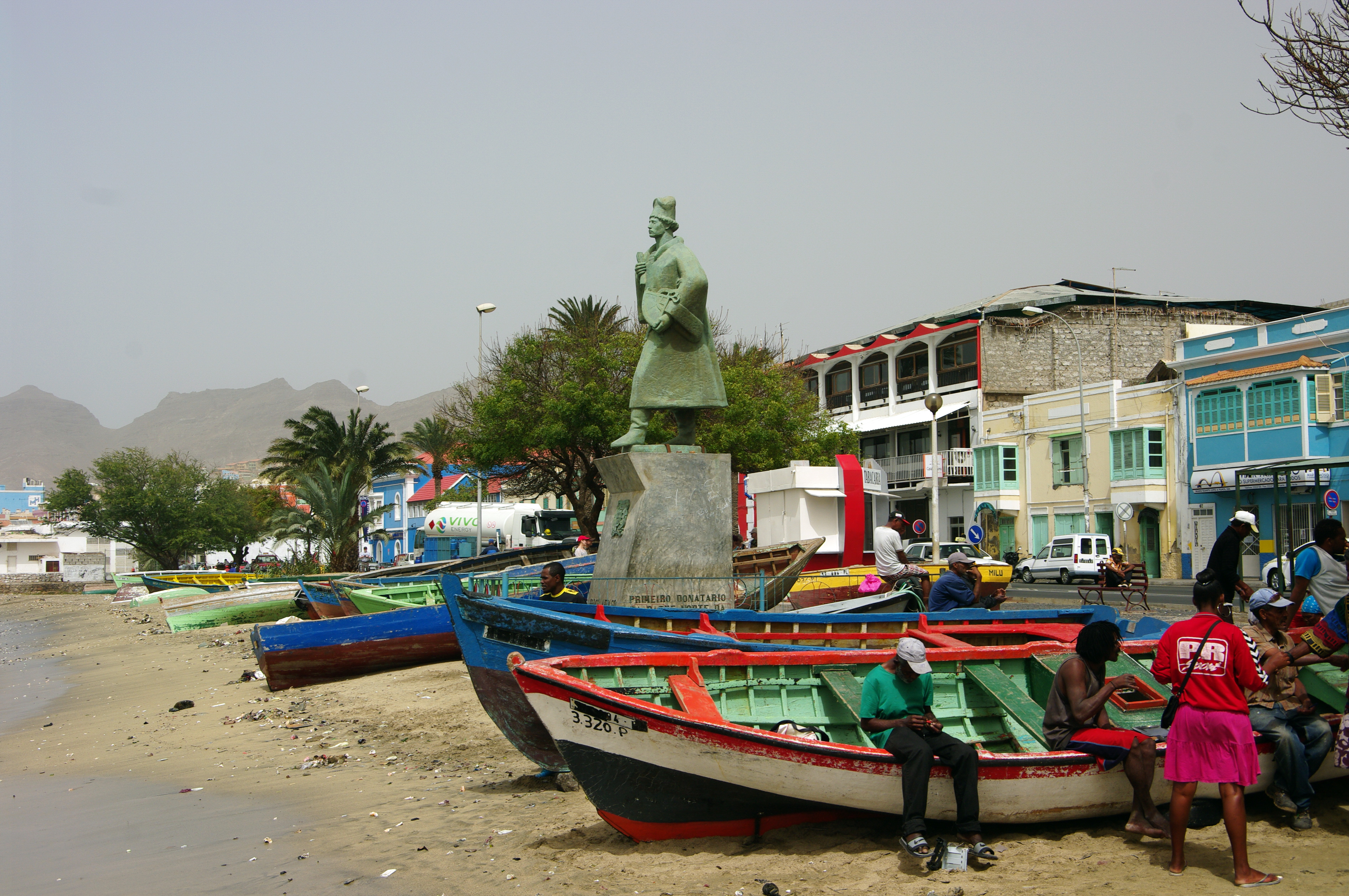 Denkmal Alfonso Diogo